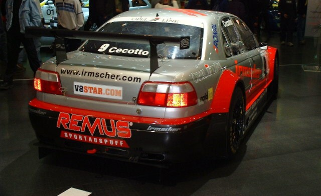 Irmscher Opel Omega V8-Star Essen Motorshow 2001